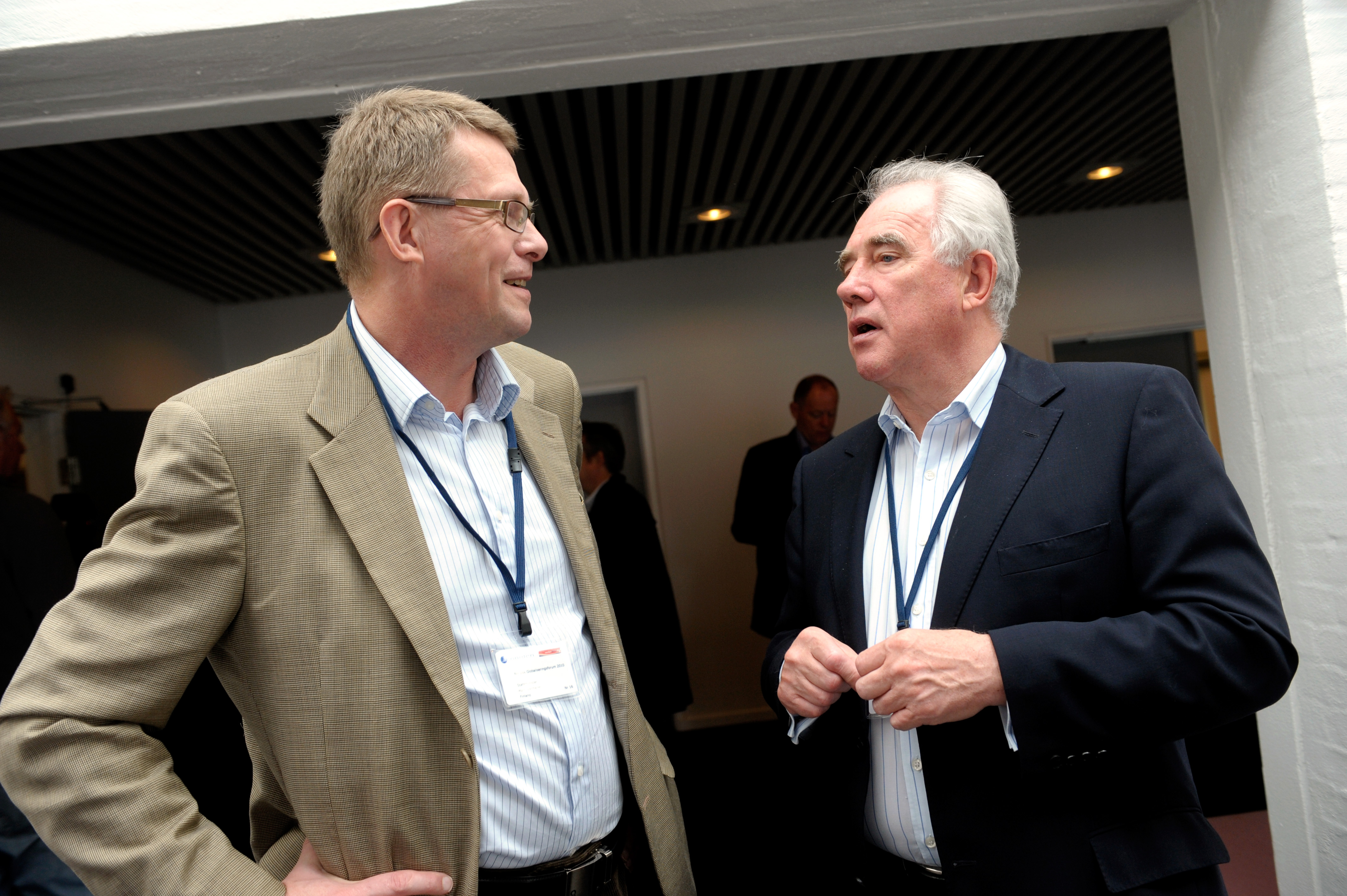 Finlands statsminister Matti Vanhanen samtalar med Nordiska ministerrådets generalsekreterare Halldór Ásgrímsson på Nordiskt globaliseringsforum 2010.